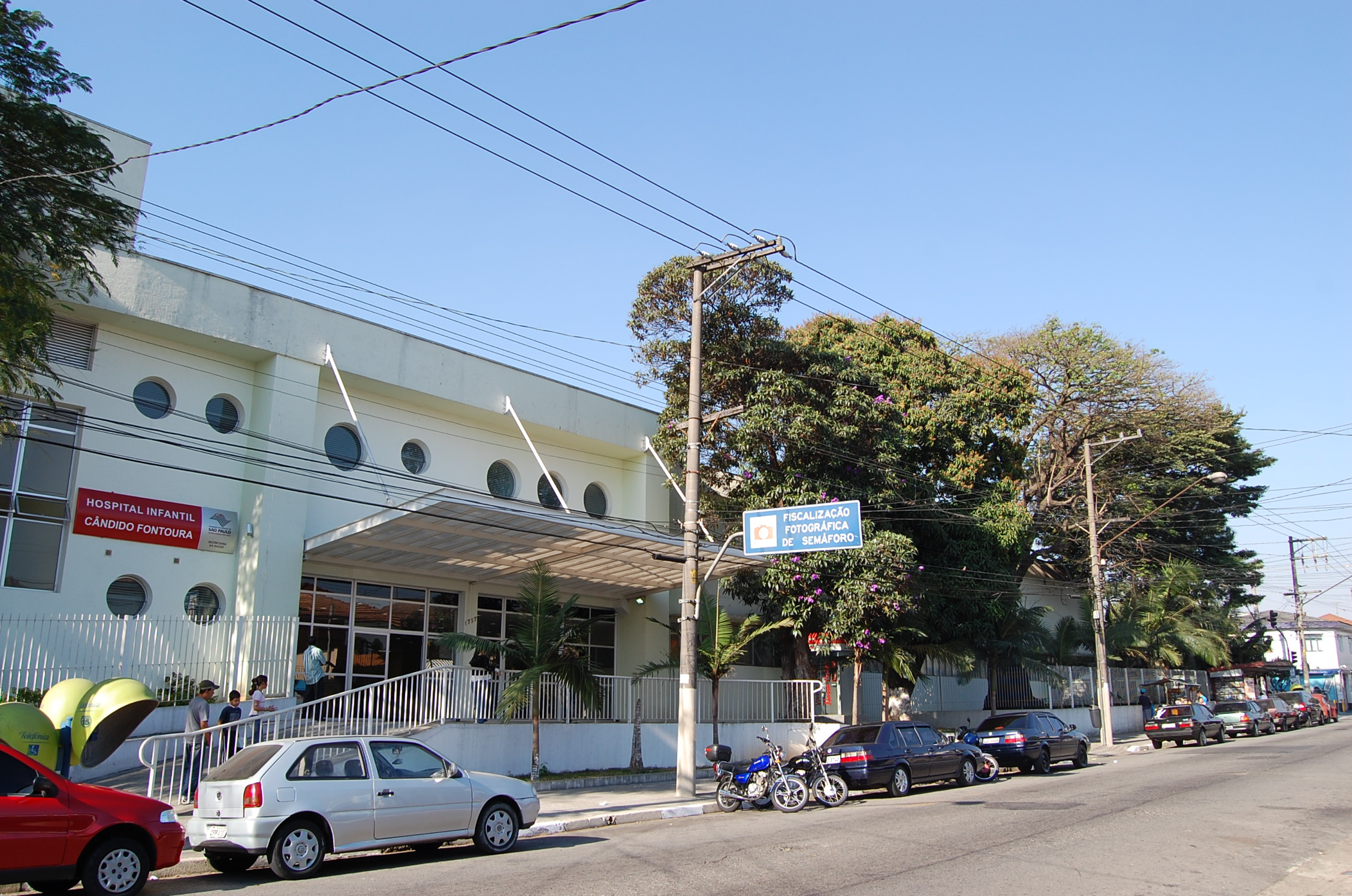 Hospital Infantil Cândido Fontoura, Mooca, São Paulo, Brasil.